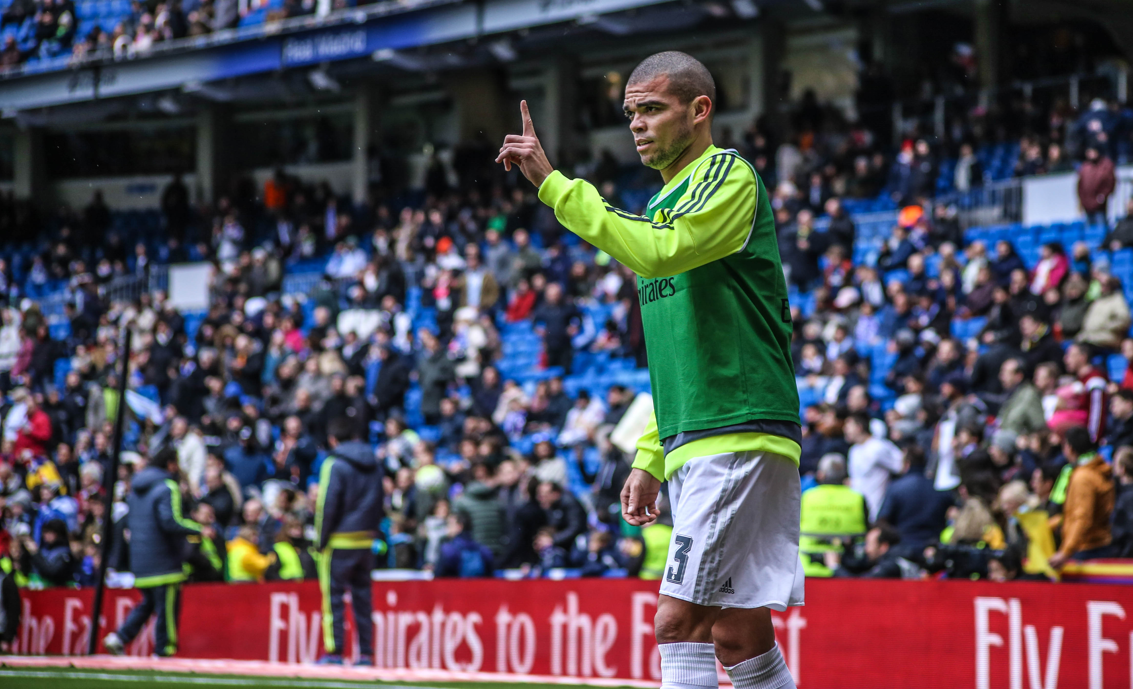 Pepe entrenando